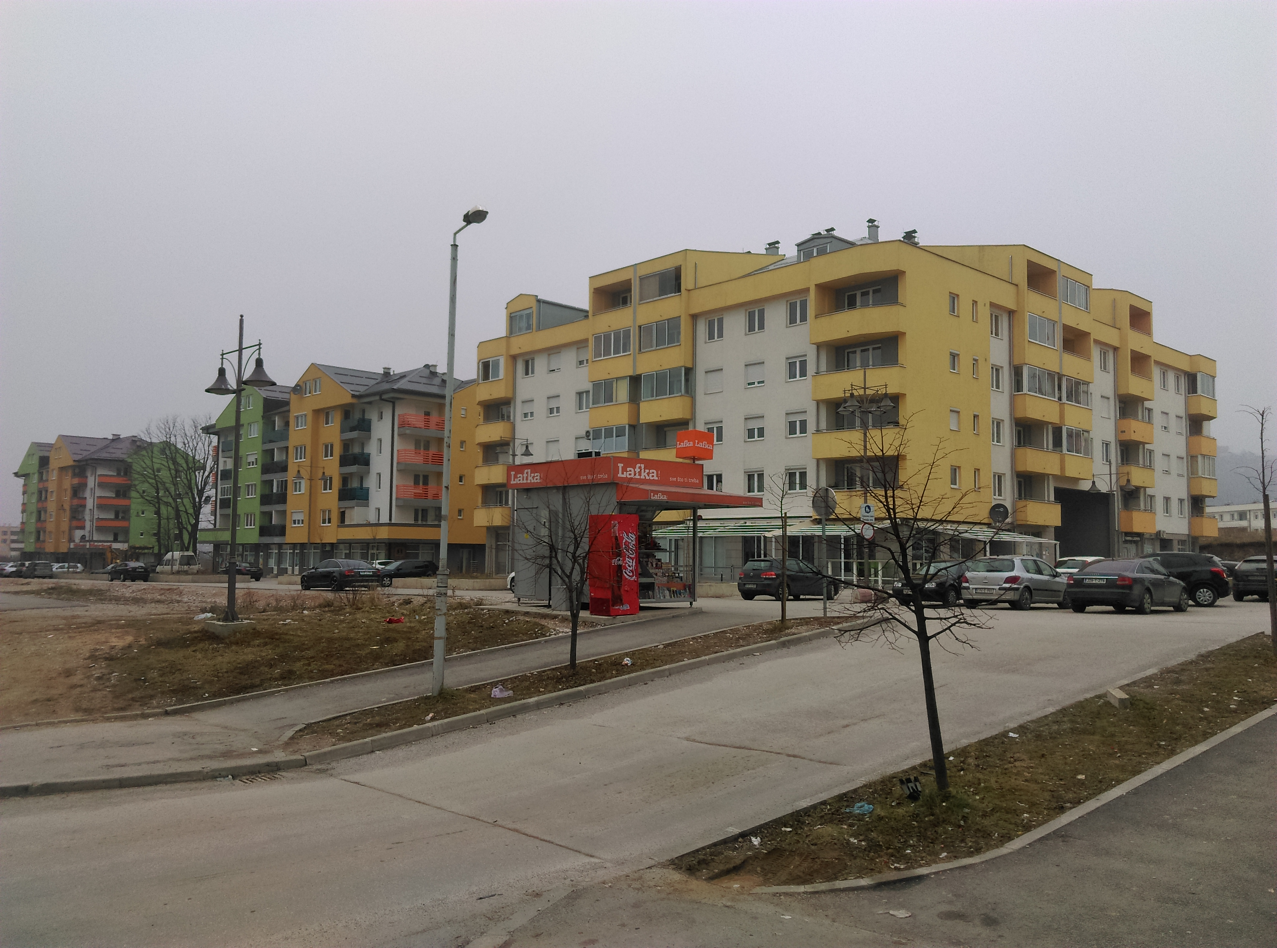 Градско насеље Вељине, Општина Источна Илиџа, Град Источно Сарајево.